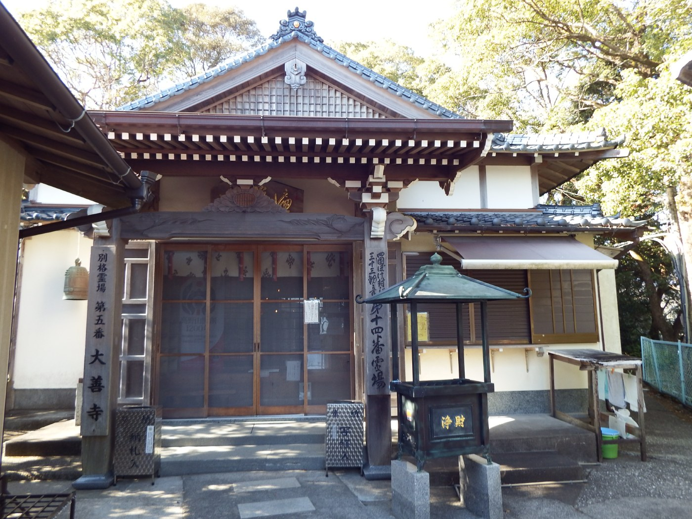 大善寺の本堂